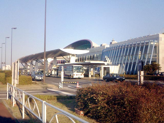 高松空港 - 日本国香川県高松市